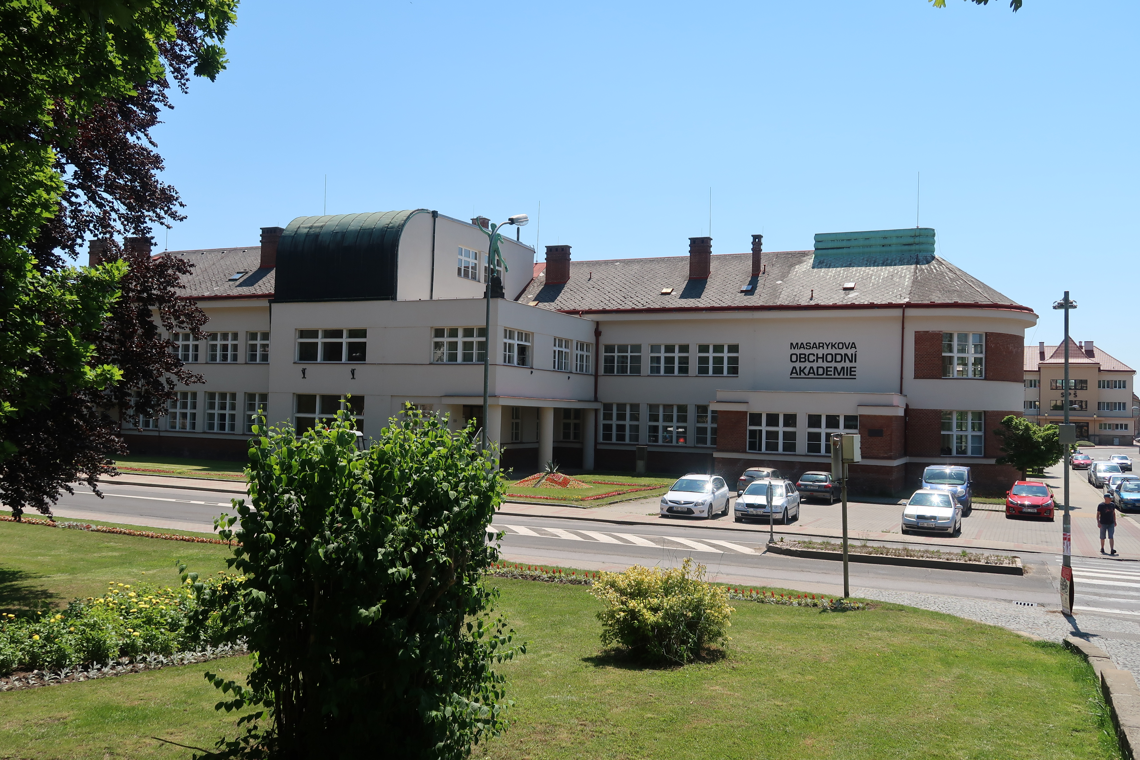 Masarykova obchodní akademie v Jičíně (1930), 17. listopadu 220.